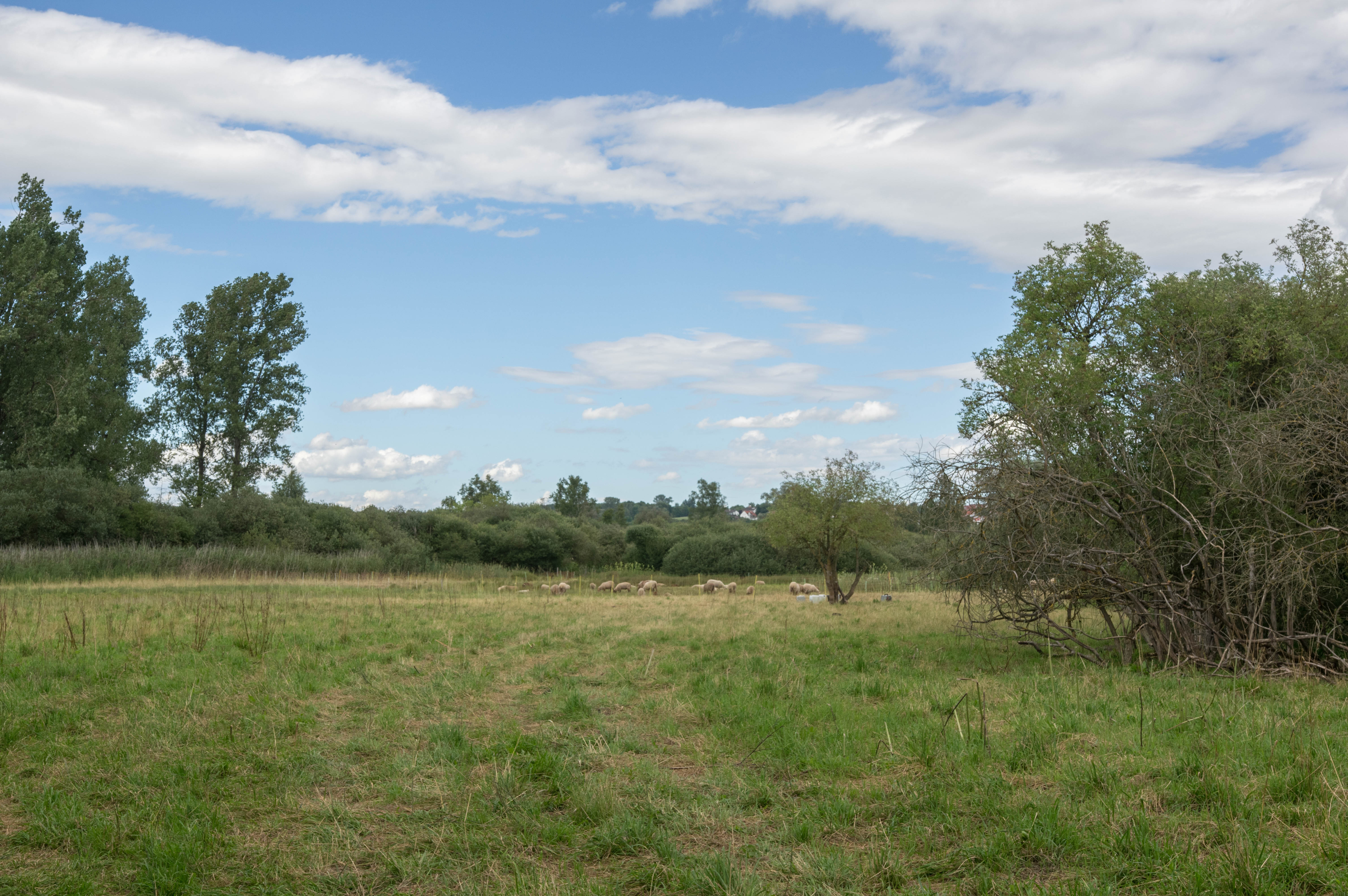 Wittislinger Moor Teilansicht von SW, LSG-00195.01 Landkreis Dillingen an der Donau